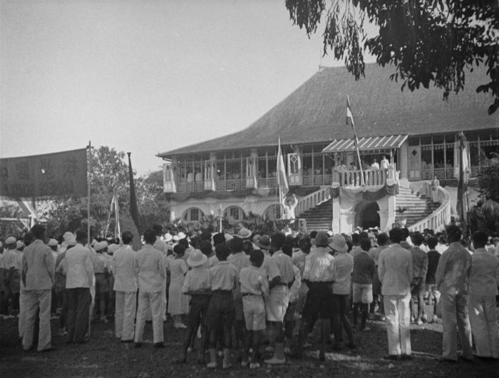 Negatief. Mensen luisteren voor het residentiehuis in Palembang naar een toespraak tijdens de viering van het regeringsjubileum van Koningin Wilhelmina